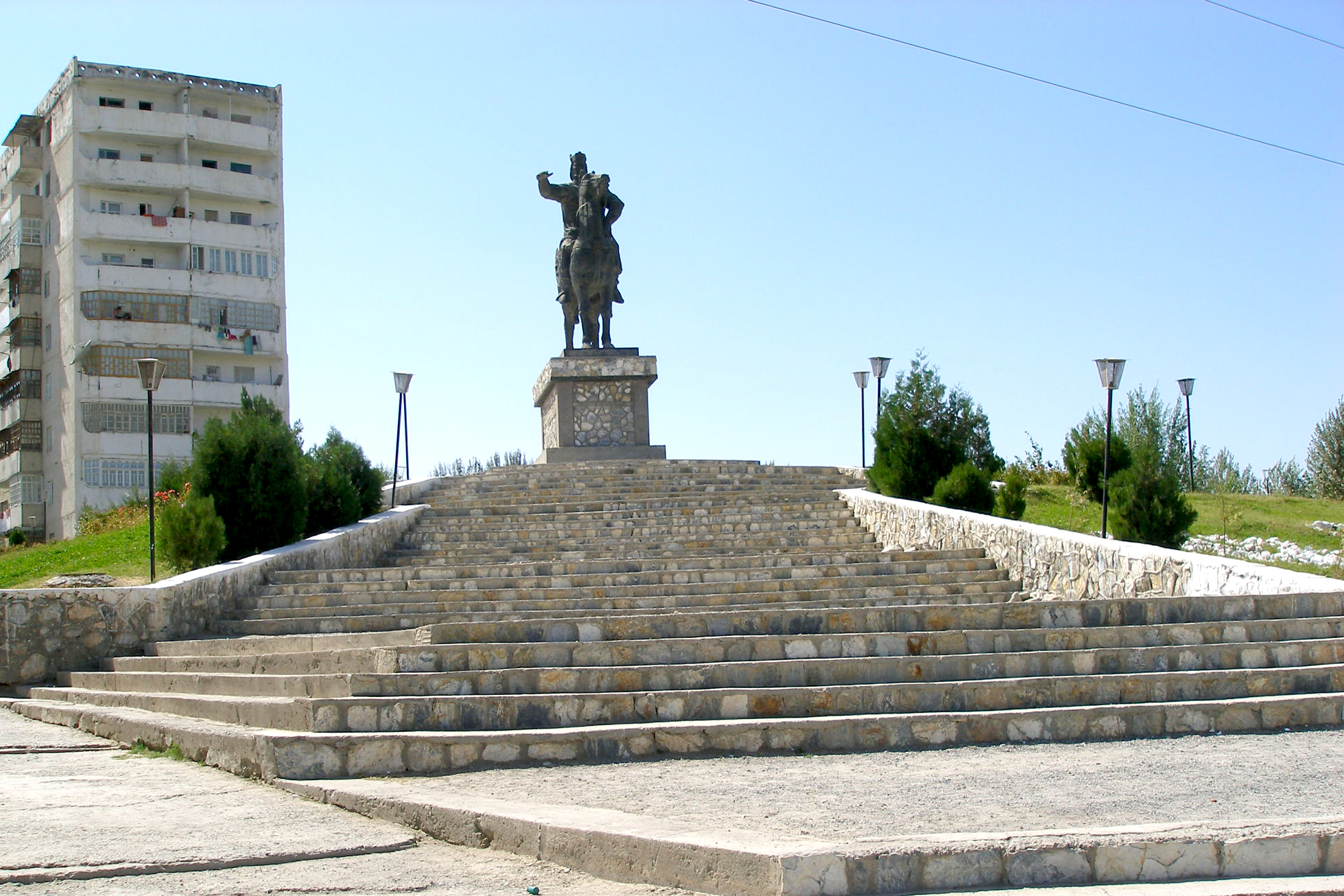 Тоҷикӣ: Гурӯҳ:Панҷакент